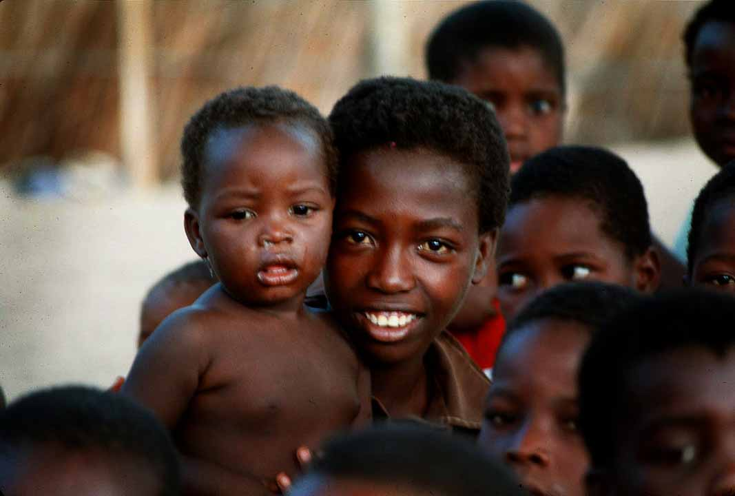 Children in MozambiqueMozambique n003